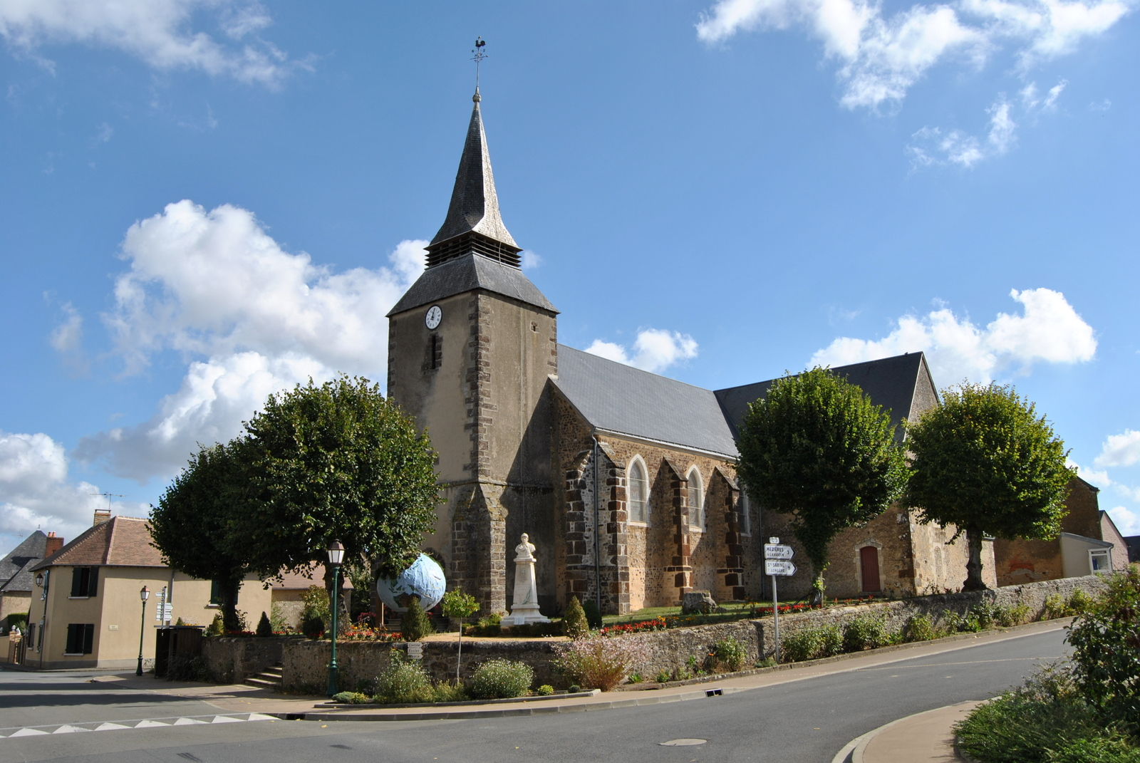 Eglise de Neuvillalais (France, Pays de la Loire)